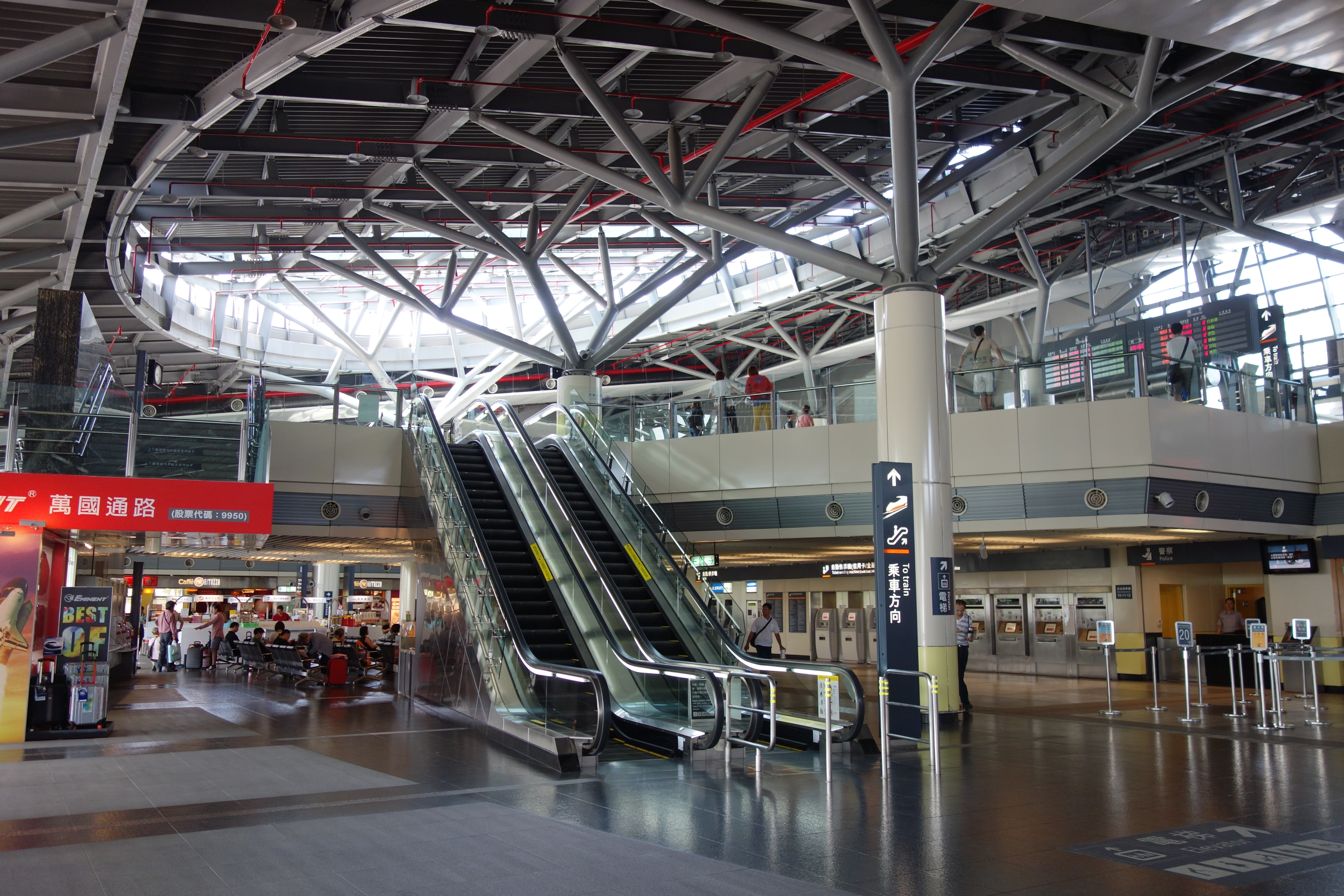 構内 （台湾高鐵・台南駅） （南側から撮影）